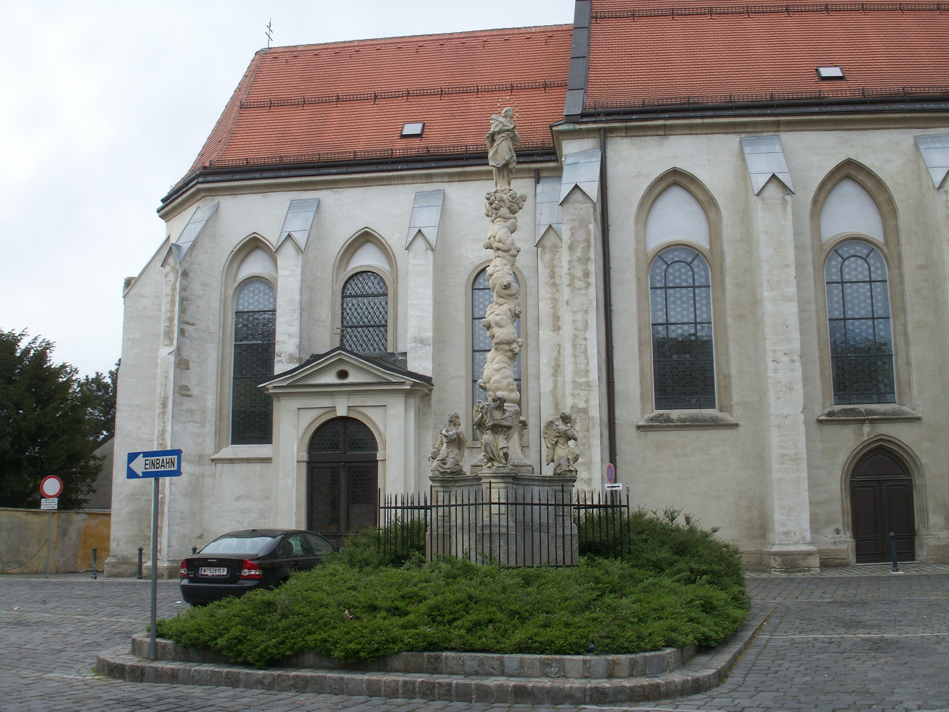 Hietzinger Pfarrkirche in Wien